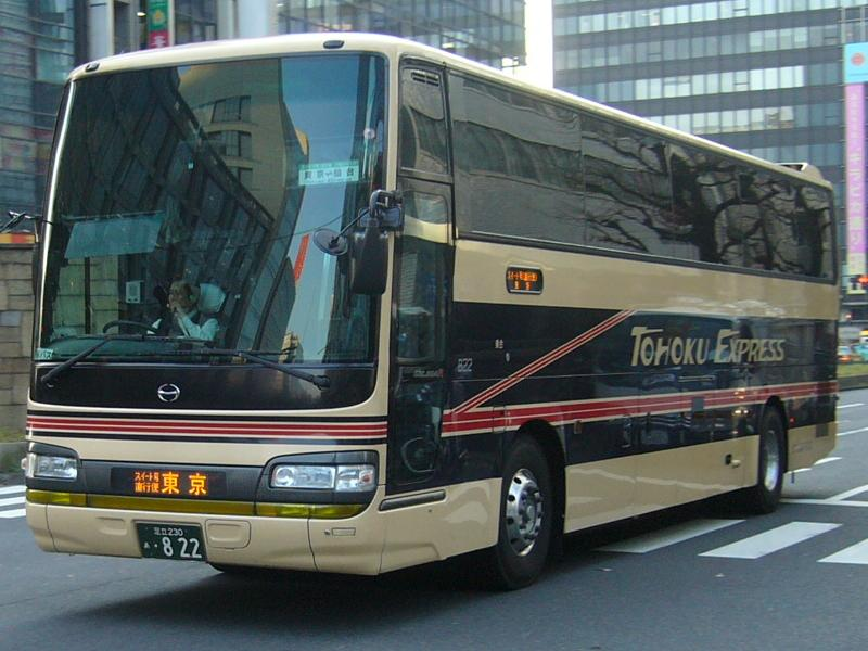 登録番号 足立230あ・822 東北急行バス所属 スイート号用 2007年2月21日 東京駅八重洲通りにて撮影